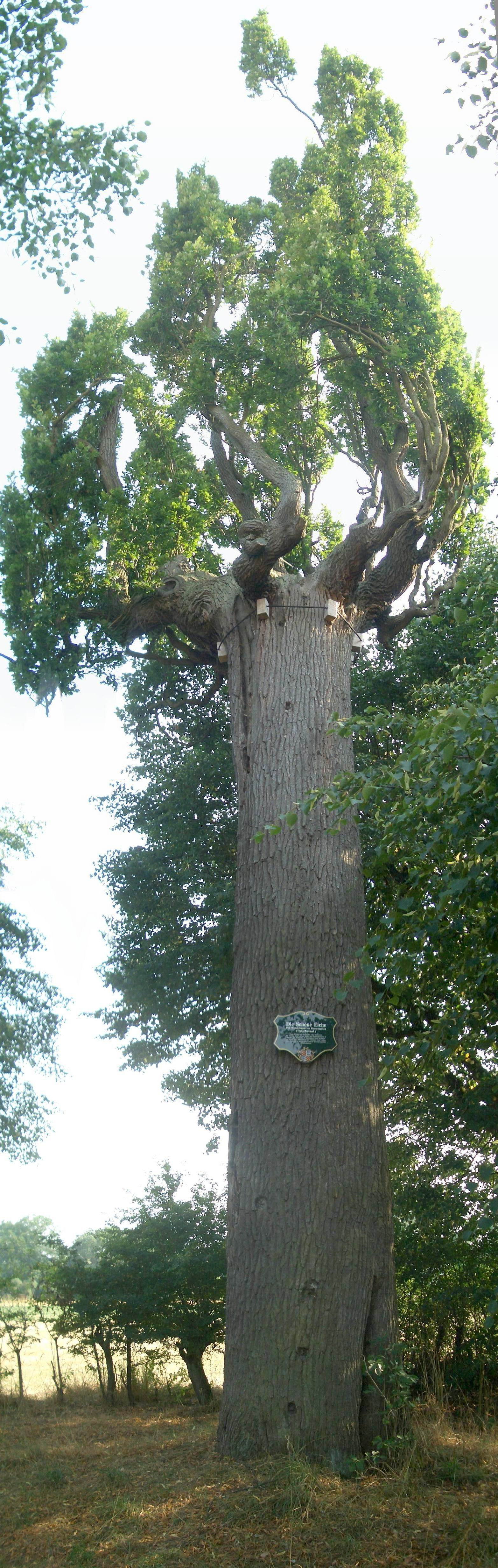 Quercus robur fasticiata in Harreshausen, Germany